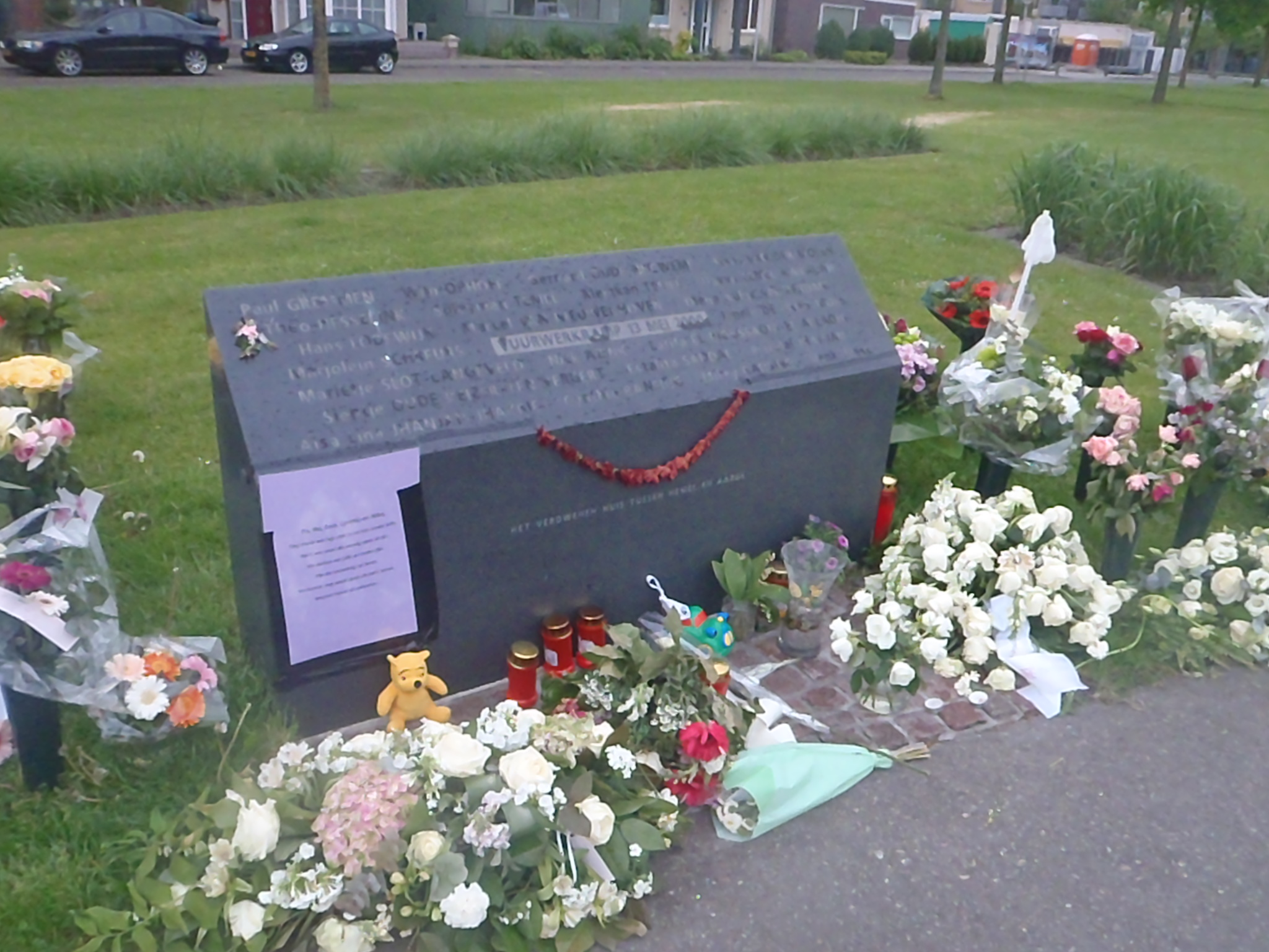 het monument voor de vuurwerkramp in het vernieuwde roombeek